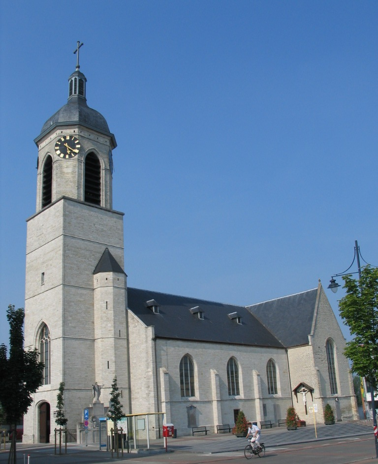 Sint-Remigiuskerk van Haacht - eigen foto